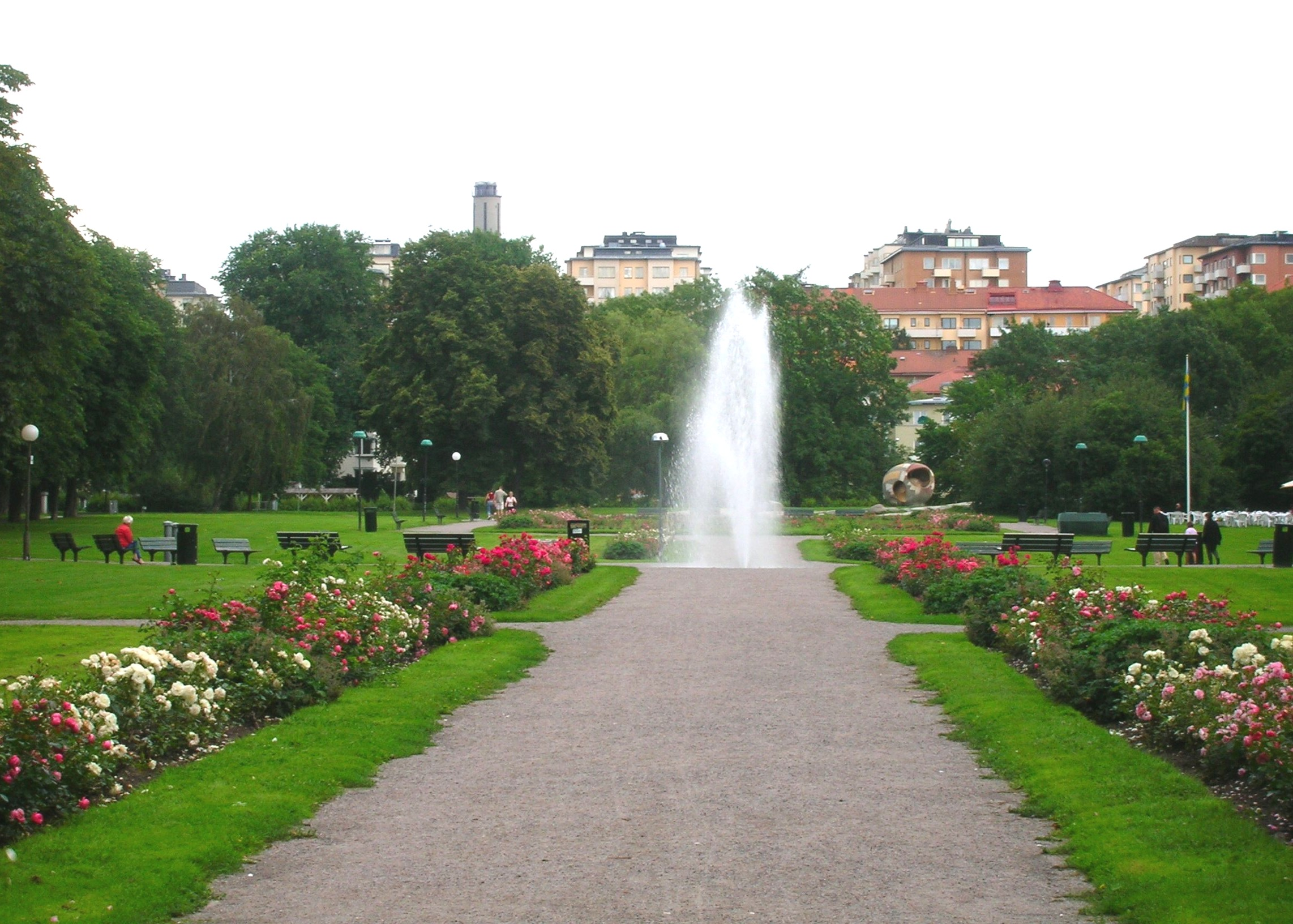 Tessinparken — Ladugårdsgärdet, Stockholm. Den anlades 1932-1940 och täcker cirka 6 hektar. I bakgrunden skymtar skulpturen Ägget av Egon-Möller Nielsen, rest 1951.